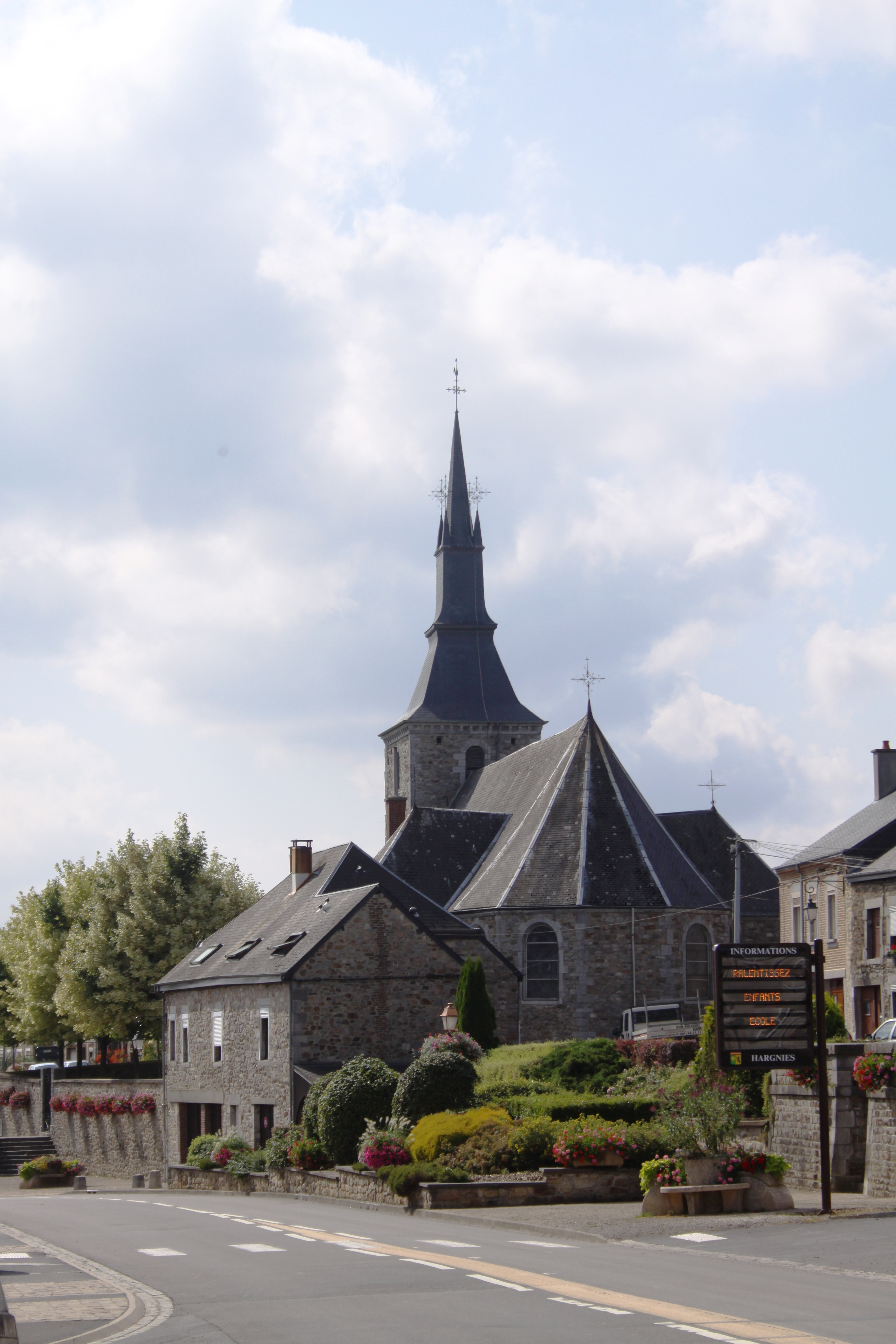 Village Ardennais